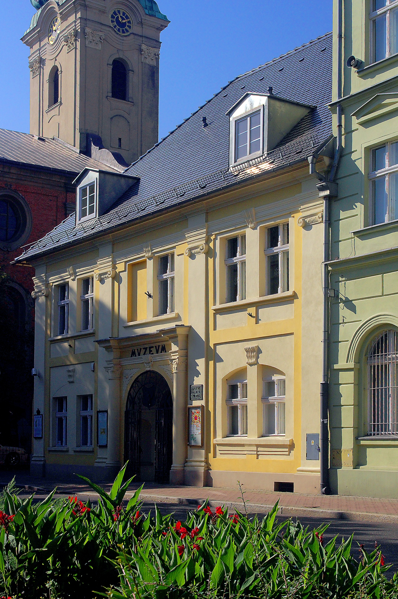 Leszno, Plac Jana Metziga 17 - pastorówka z 1. połowy XVIII w., obecnie Muzeum Okręgowe (zabytek nr 503/Wlkp/A)